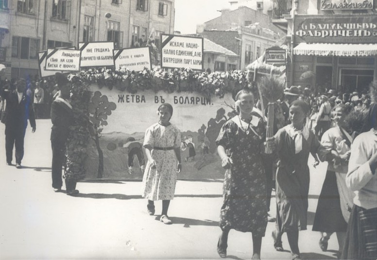 4-ти селскостопански културен и национален събор, 28 - 29 август 1938 г., гр. Варна. Парад на участниците в събора по ул. Княз Борис І. На преден план са представителите на село Болярци, Варненско.